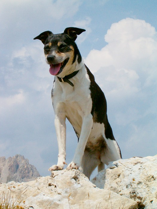 Boerenfox